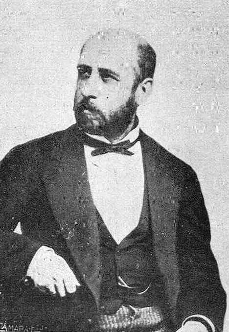 Eduardo Gasset Artime